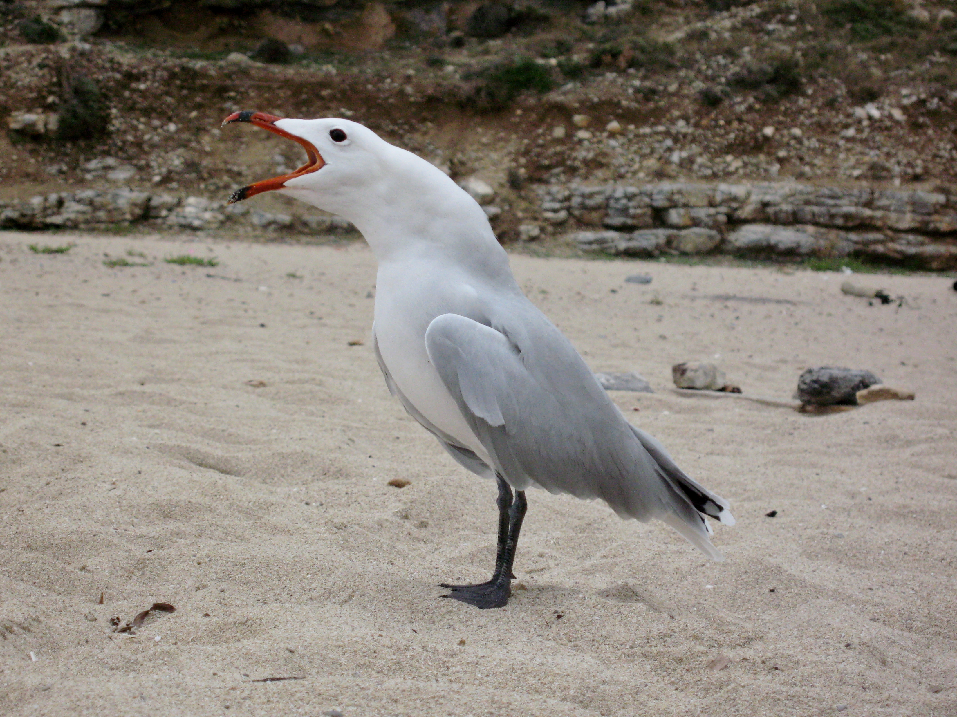 Korallenmöwe (Larus audouinii) an der Cala Torta, Gemeinde Artà, Mallorca, Spanien